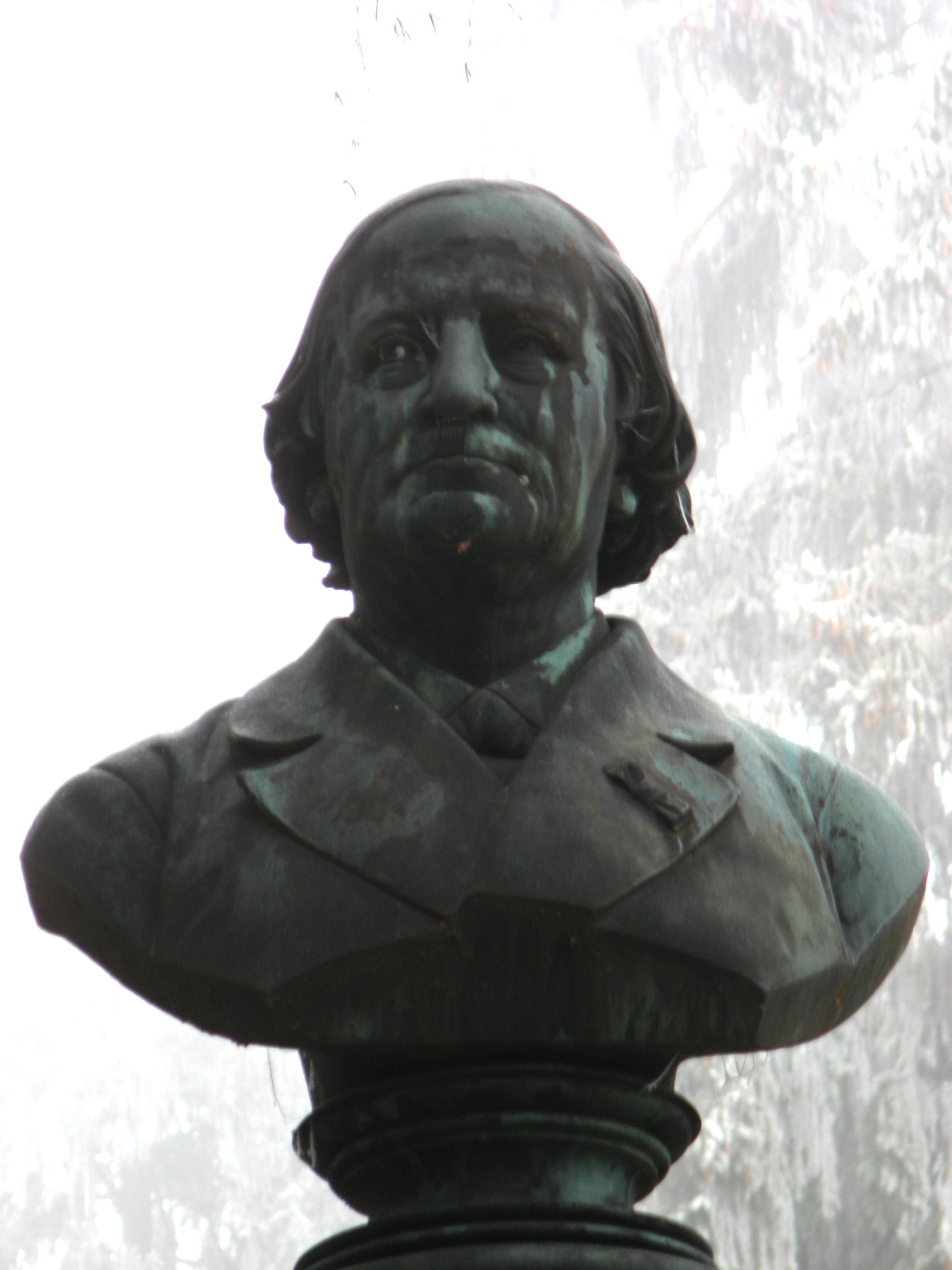 Franz Abt - Bildnis am Grabmal Nordfriedhof Wiesbaden